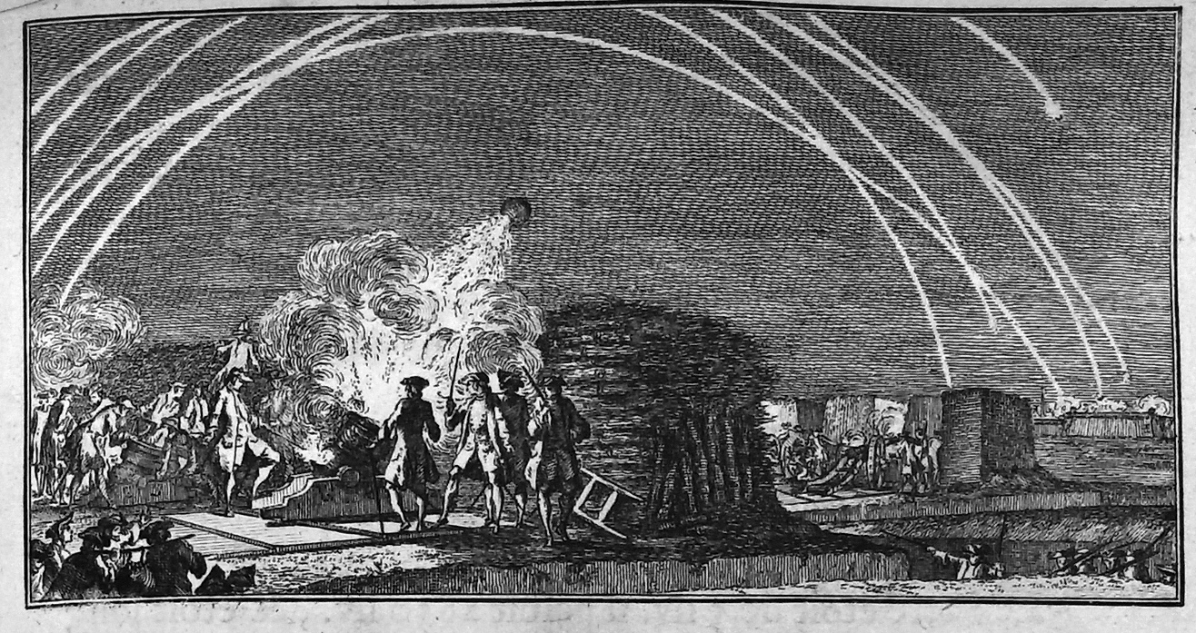 Mémoires d'artillerie, recueillis par M. Surirey de Saint Remy, exemplaire de la B.M. de Reims, troisième édition.